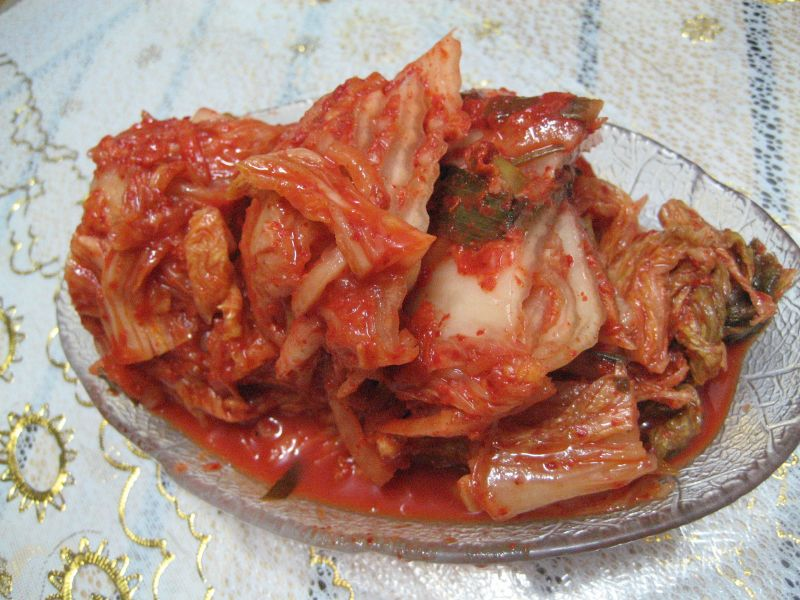 Kimchi